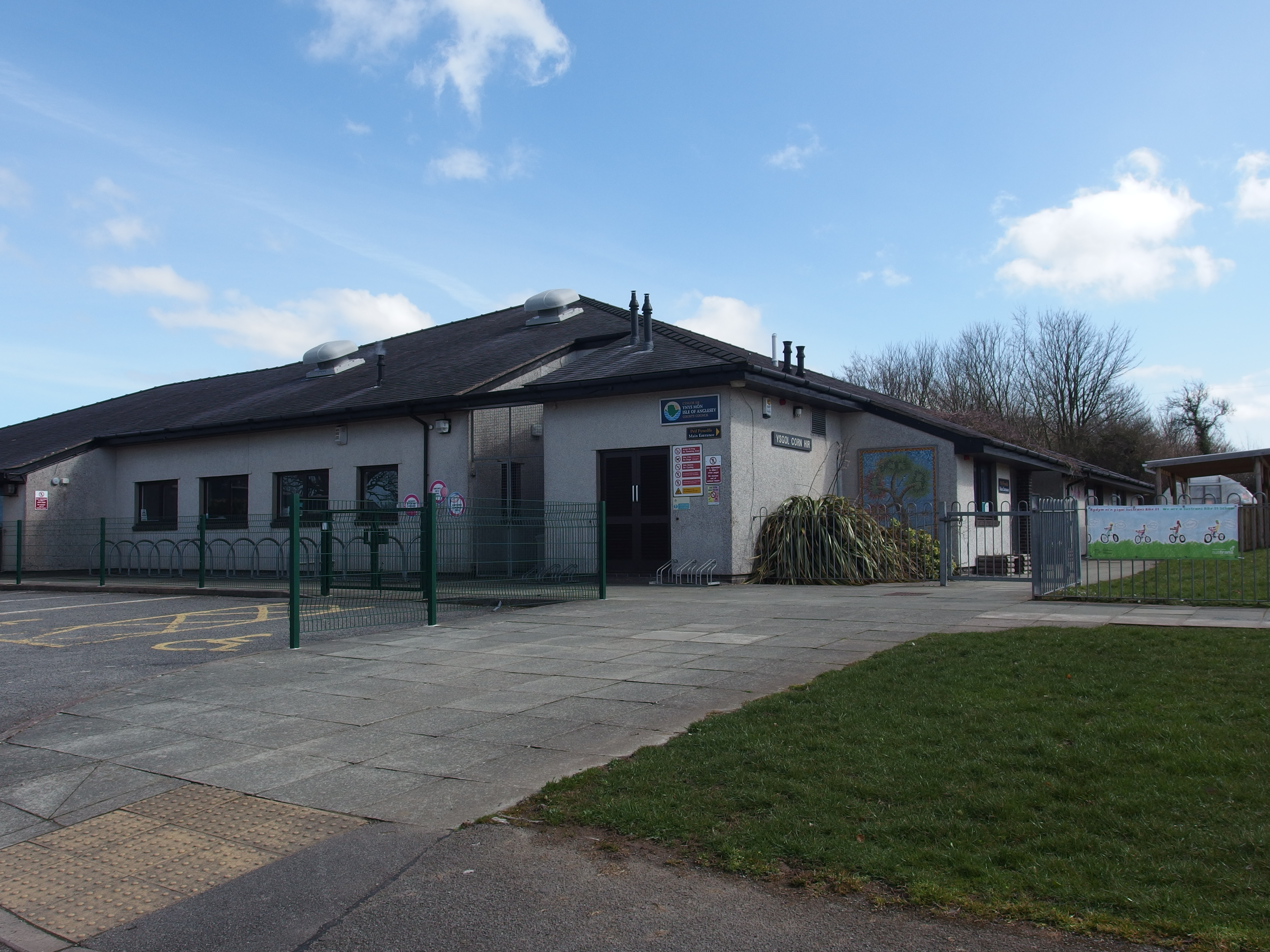 llun o ysgol Corn Hir, Llangefni, Ynys Mon